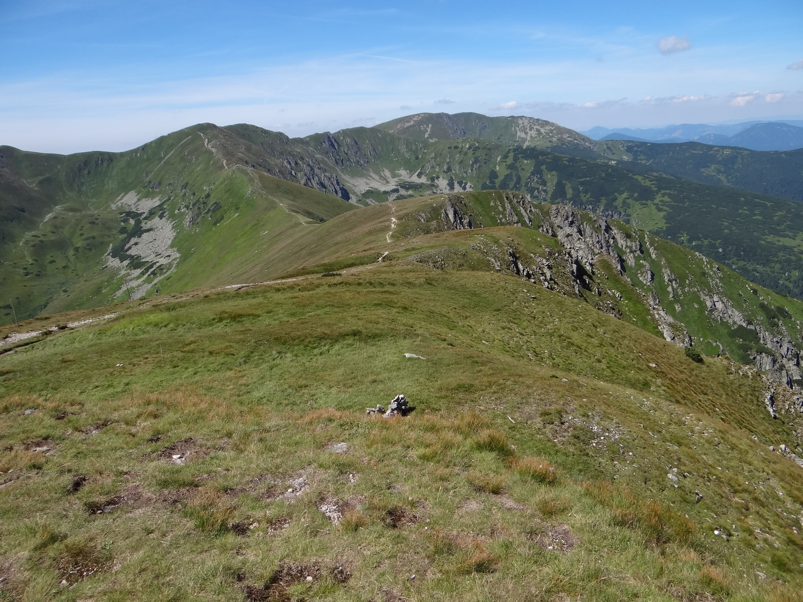 Widok ze szczytu Poľana na przełęcz Krížske sedlo oraz szczyty Kotliska, Chabenec i Ostredok